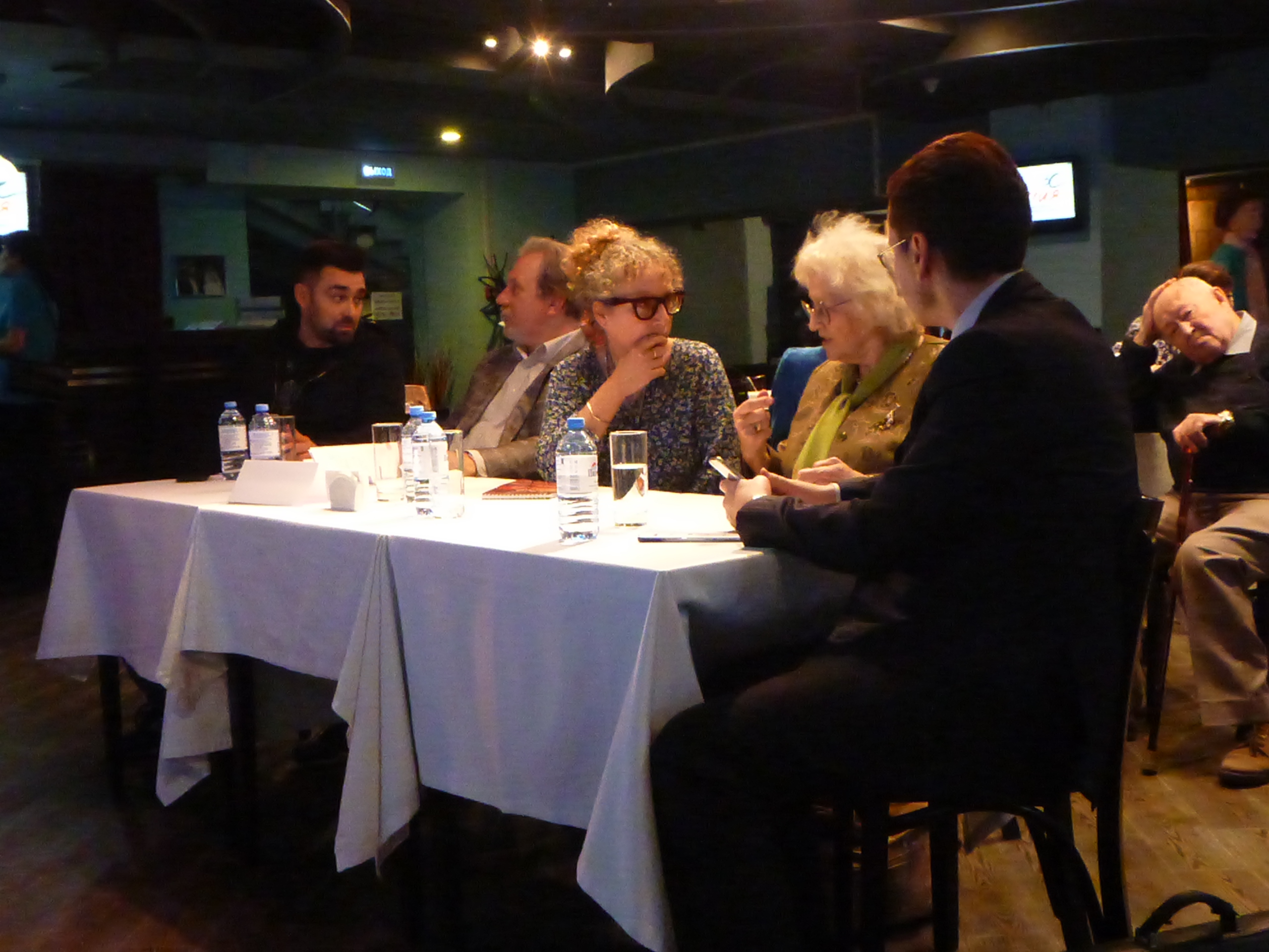 Галина Прожиго, Александр Кондрашов и Платон Беседин в жюри кинофестиваля Россия Екатеринбург 2019 года